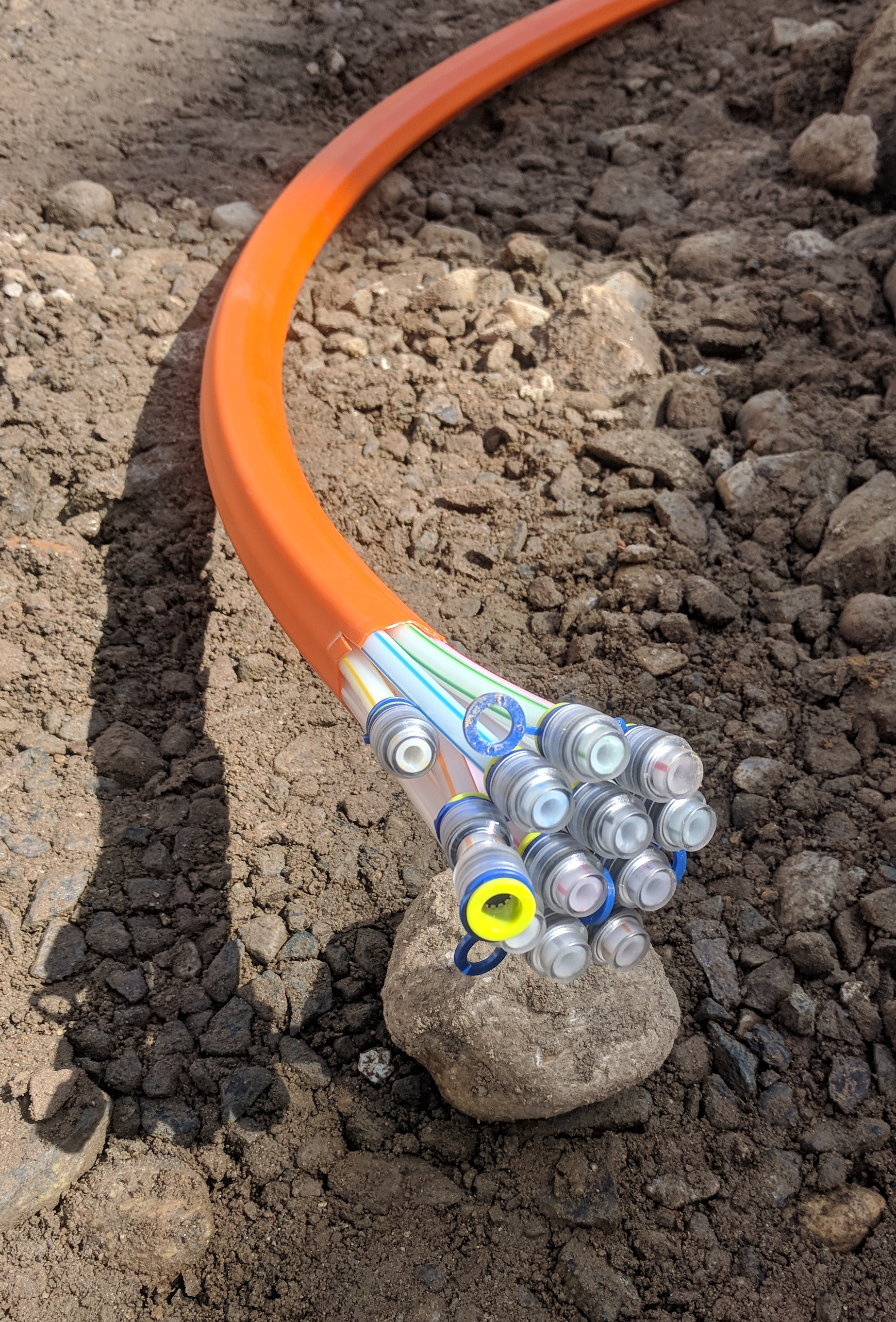 LWL-Leerverrohrung (Multitube 12x10/6mm), die in Knittelfeld anläßlich der Hauptplatzneugestaltung mitverlegt wird, um die Gebäude mit Lichtwellenleitertechnologie zu versorgen. Der Lichtwellenleiter wird später in die einzelnen Rohre eingeblasen. Die einzelnen Rohre sind in folgenden Farben codiert: orange, schwarz, türkis, violett, braun, grau, weiß, gelb, blau, grün, rot, rosa